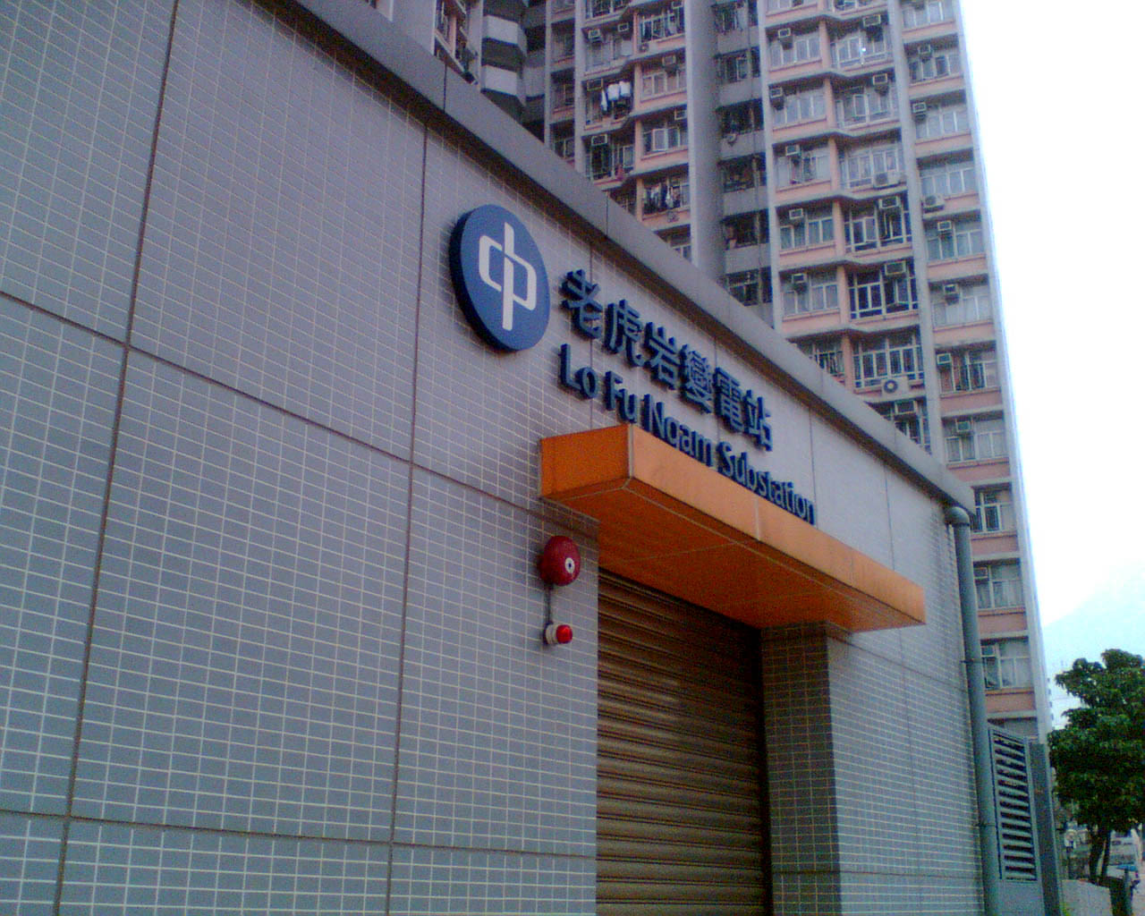 位於樂富邨外的變電站仍稱老虎岩